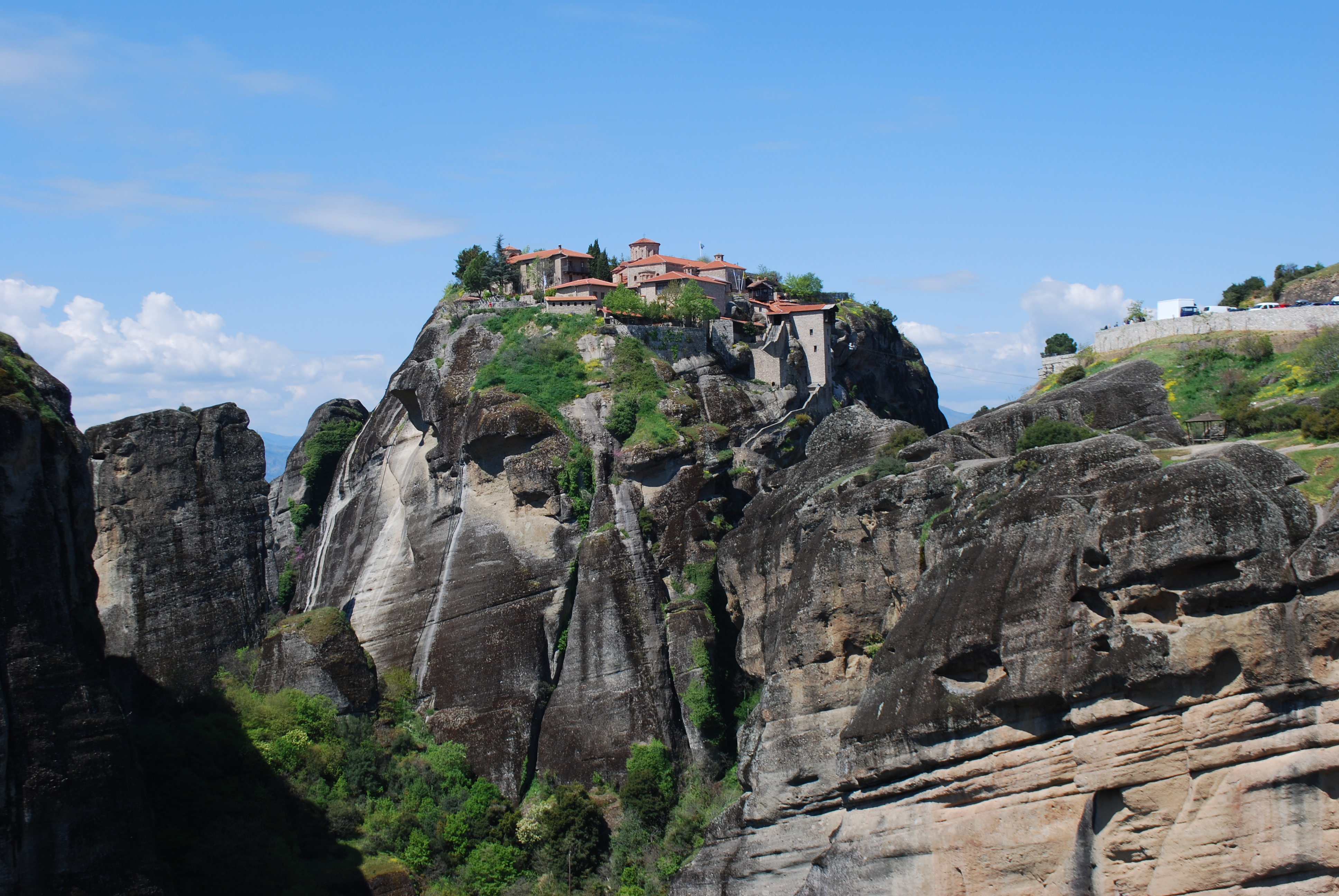 Vue du Grand Météore depuis le monastère de Varlaam, aux Météores.